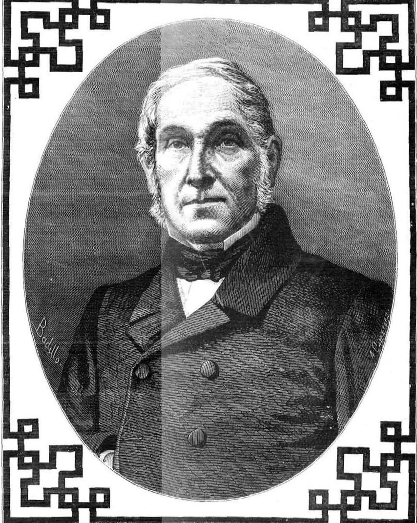 Luis López de la Torre Ayllón. Grabado de Arturo Carretero por dibujo de Félix Badillo, La Ilustración Española y Americana, 22 de febrero de 1877